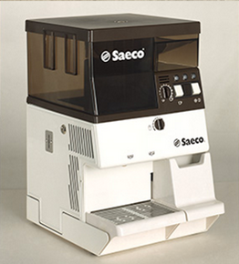 Saeco Superautomica